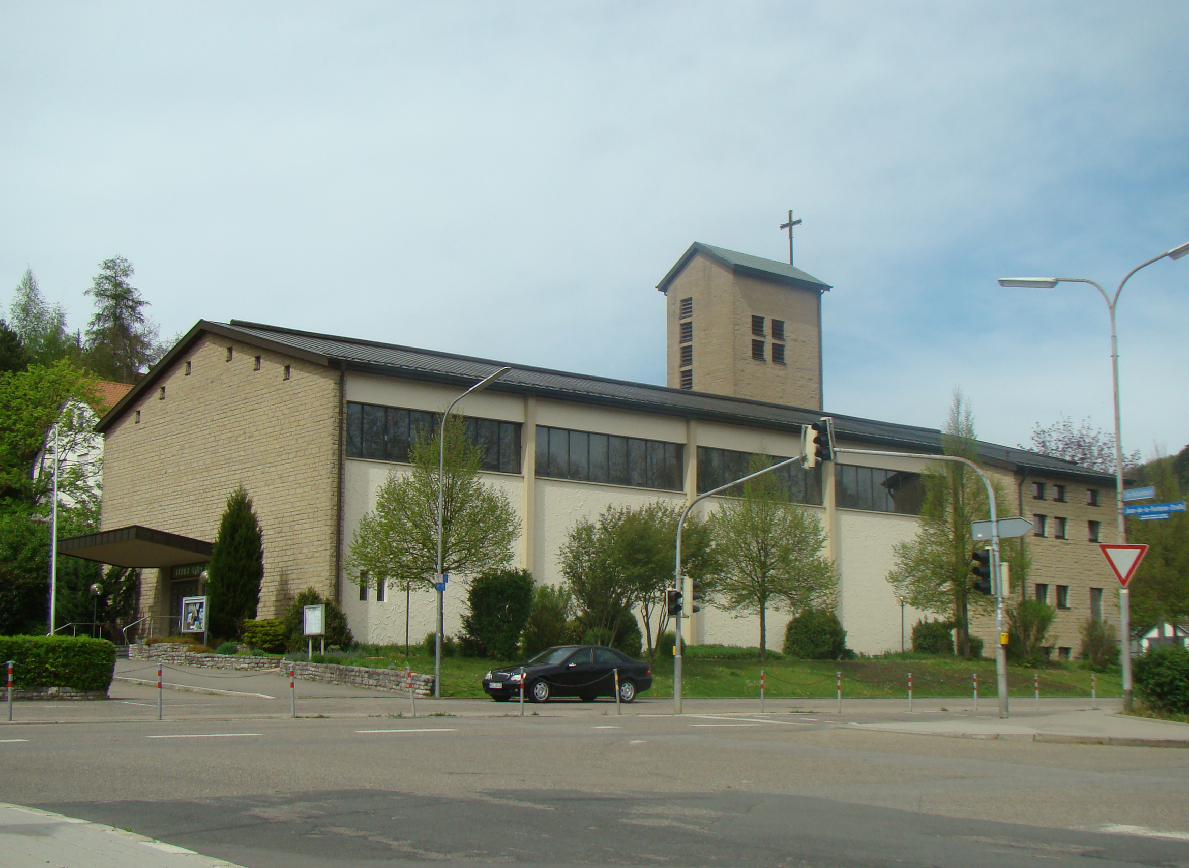 Kath. Kirche St. Josef in Mosbach